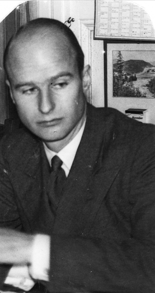 portrett, mann, filmprodusent, brystbilde.